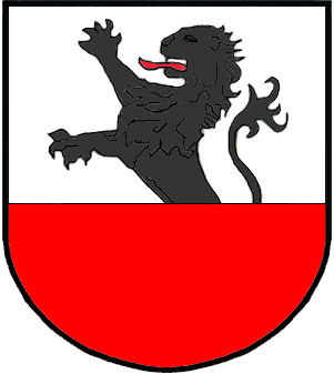 Herb sołectwa Harta w gminie Dynów w województwie podkarpackim.